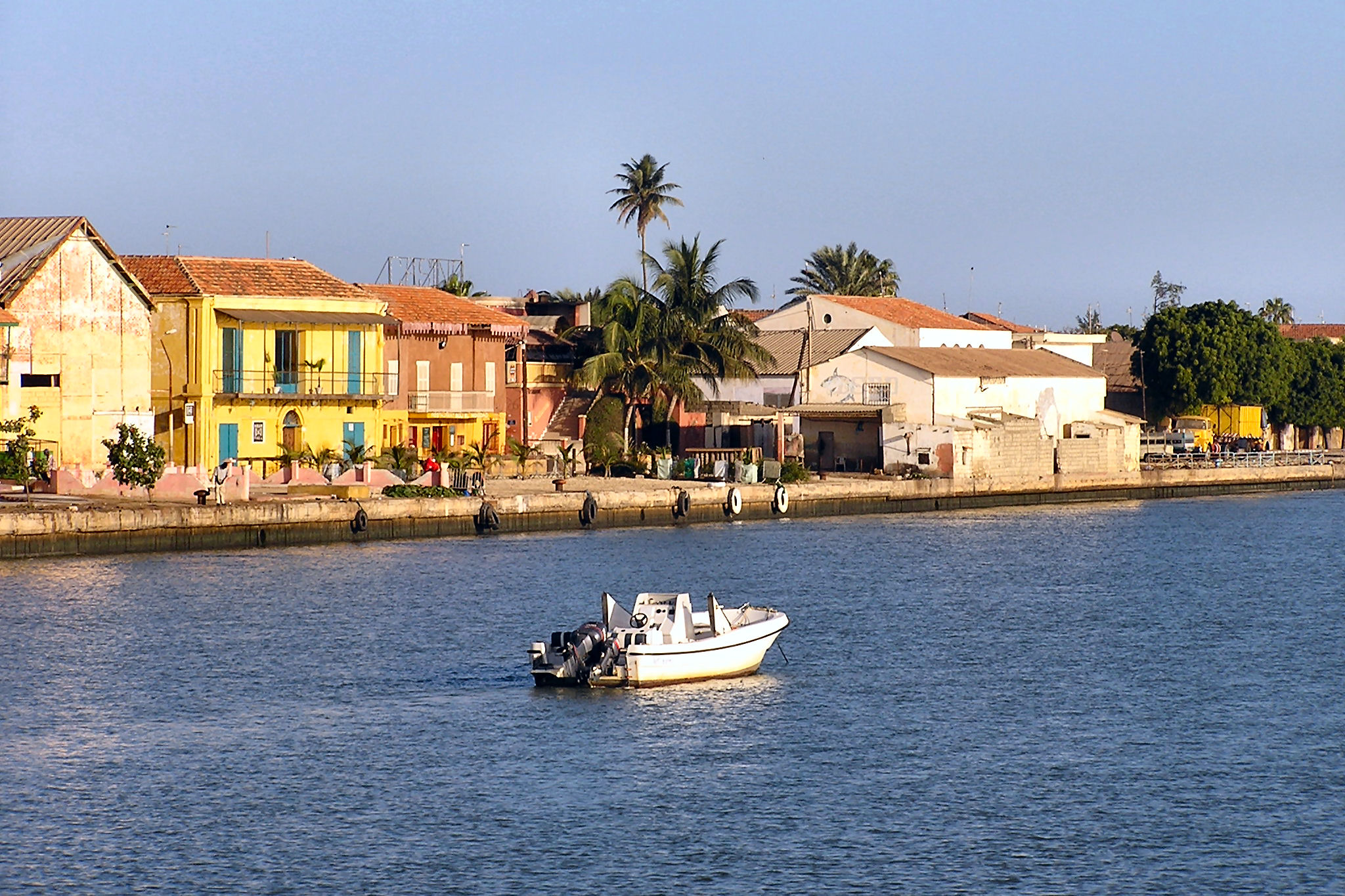 Saint Louis du Sénégal, vue sur le quartier Nord de l'ile